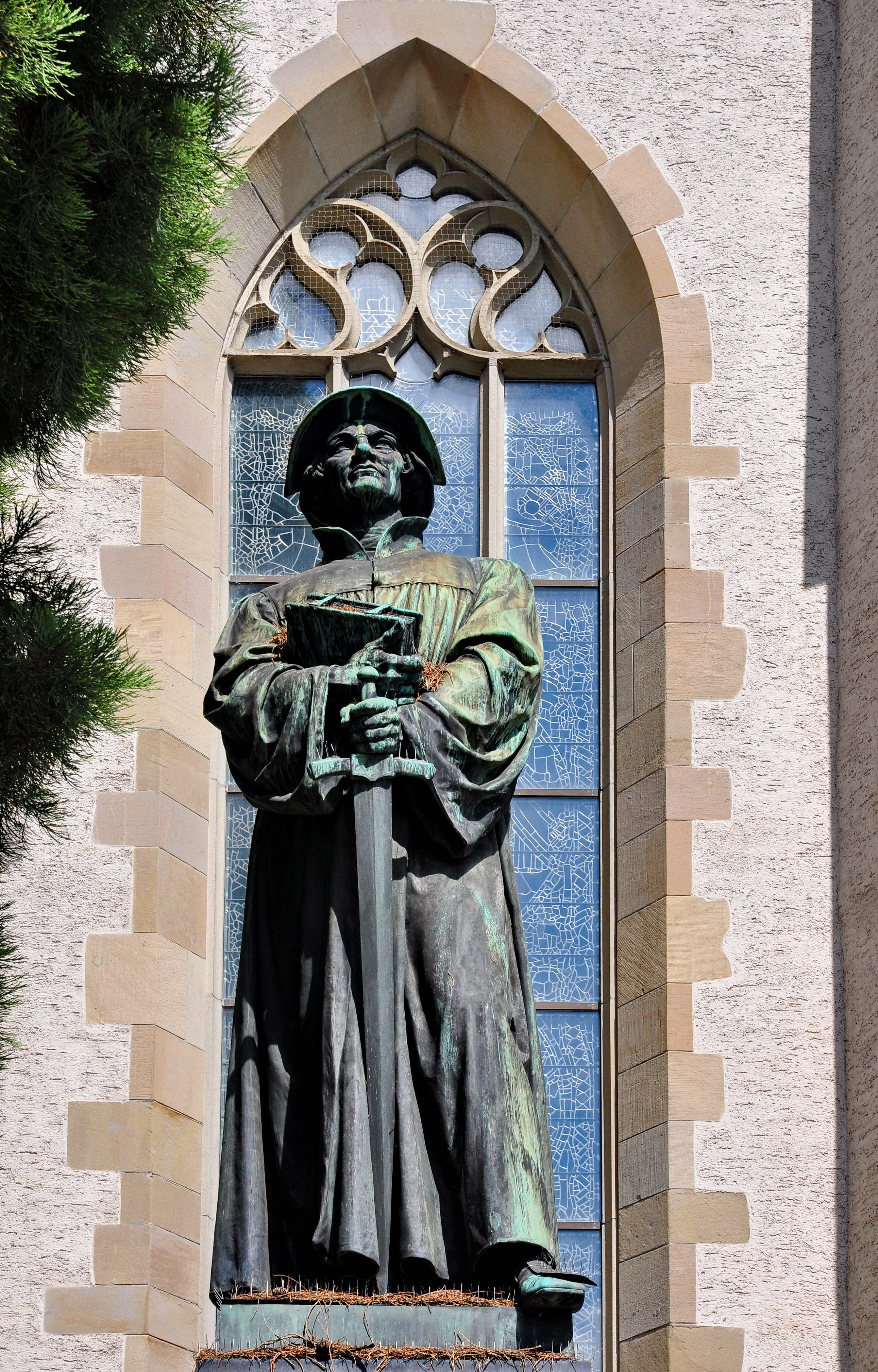 Ulrich Zwingli memorial, Wasserkirche in Zürich (Switzerland)